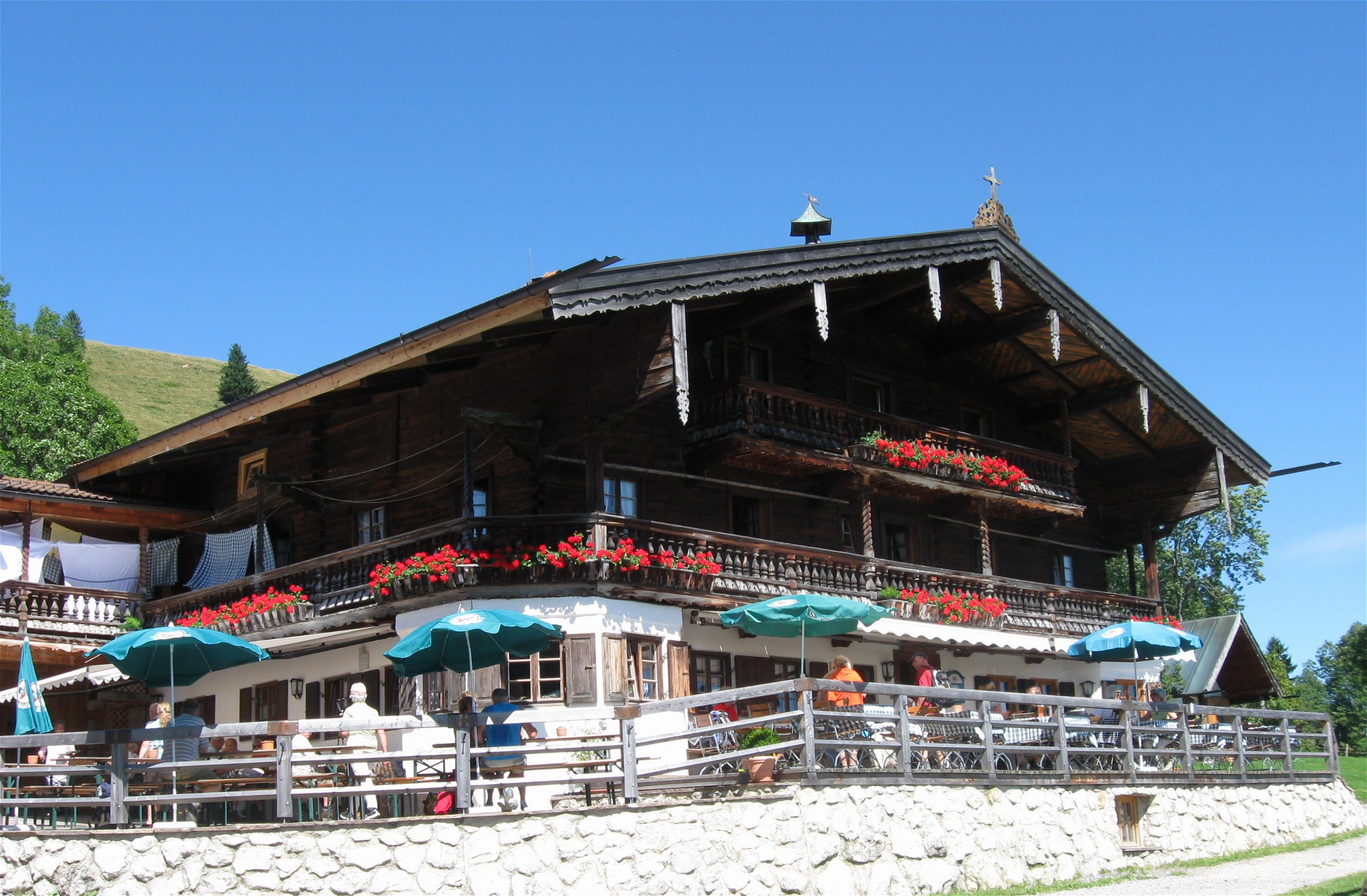 Asten 2; Flur Asten; Nähe Asten. Ehem. Bergbauernhaus, Einfirsthof, "Hinterasten", seit ca. 1920 Berggasthof Hohe Asten, zweigeschossiger Flachsatteldachbau mit Eckerkern, Blockbauobergeschoss, umlaufender Laube und Hochlaube, wohl 17. Jh., Lauben 18. Jh., um 1920 Umbau zur Gastwirtschaft